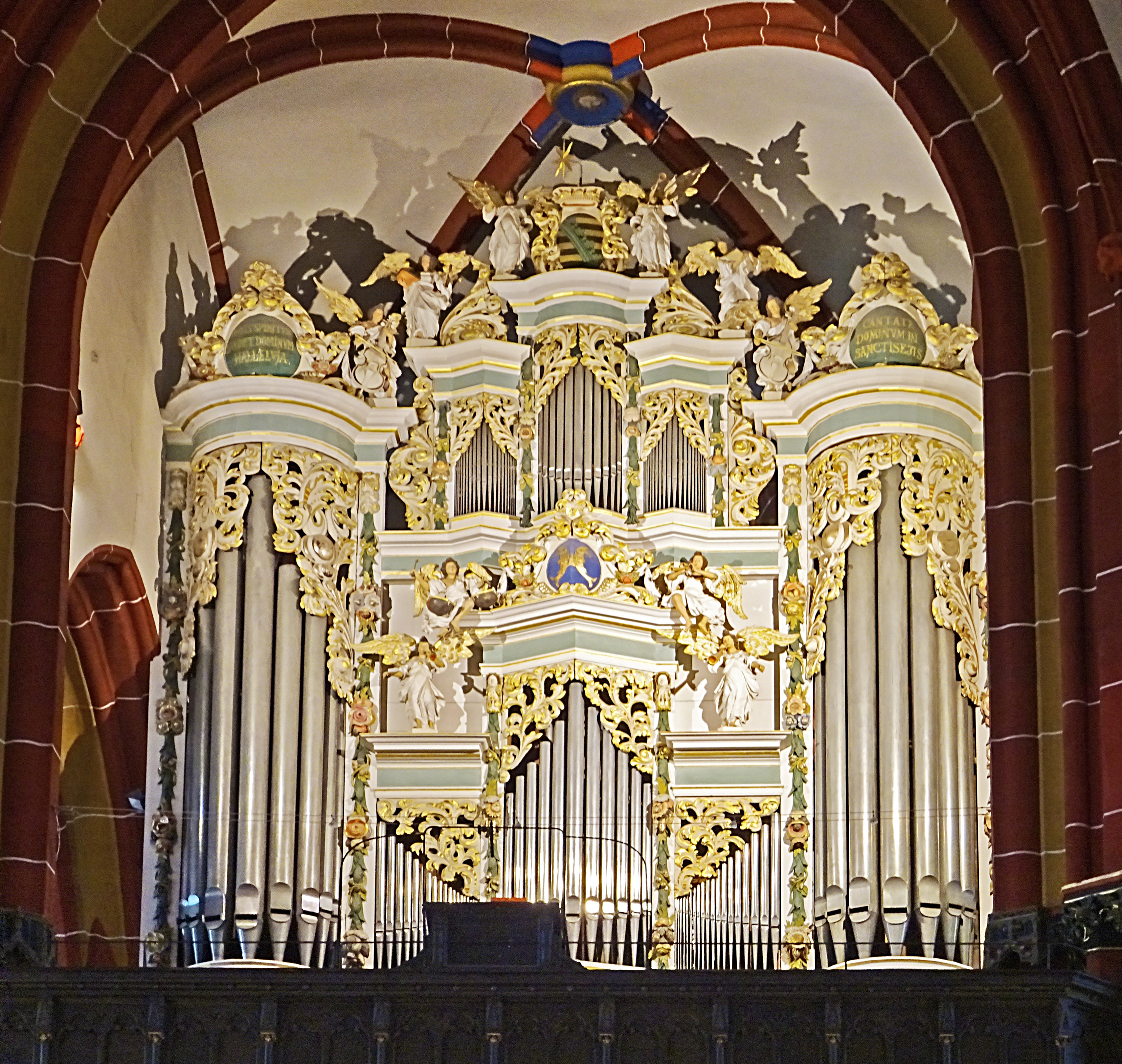 Sauer-Orgel (1894, III/P50) im alten Barock-Prospekt von Johann-Georg Ziegenspeck (1714) in der Johanneskirche Saalfeld